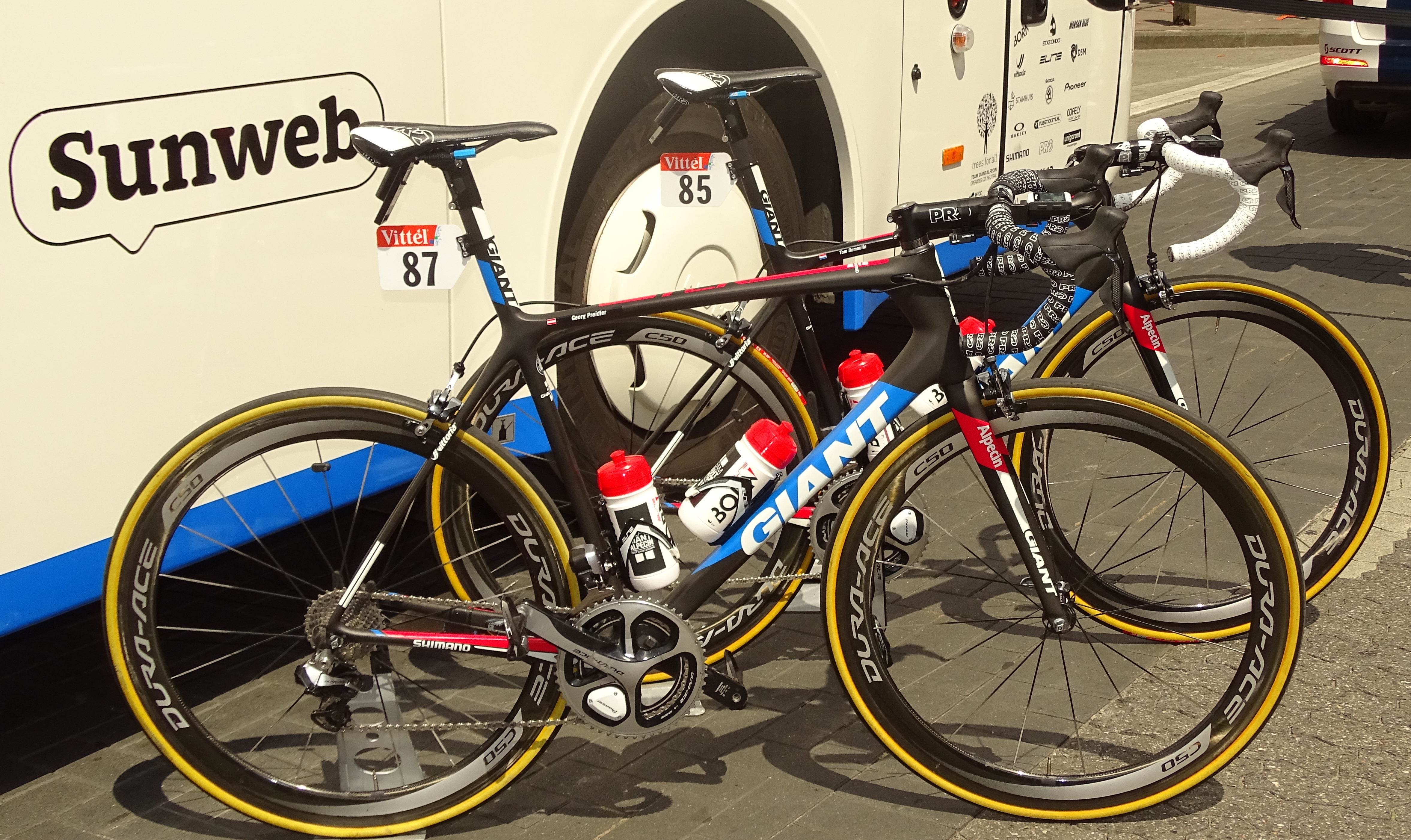 Reportage réalisé le lundi 6 juillet à l'occasion du départ de la troisième étape du Tour de France 2015 à Anvers, Belgique.